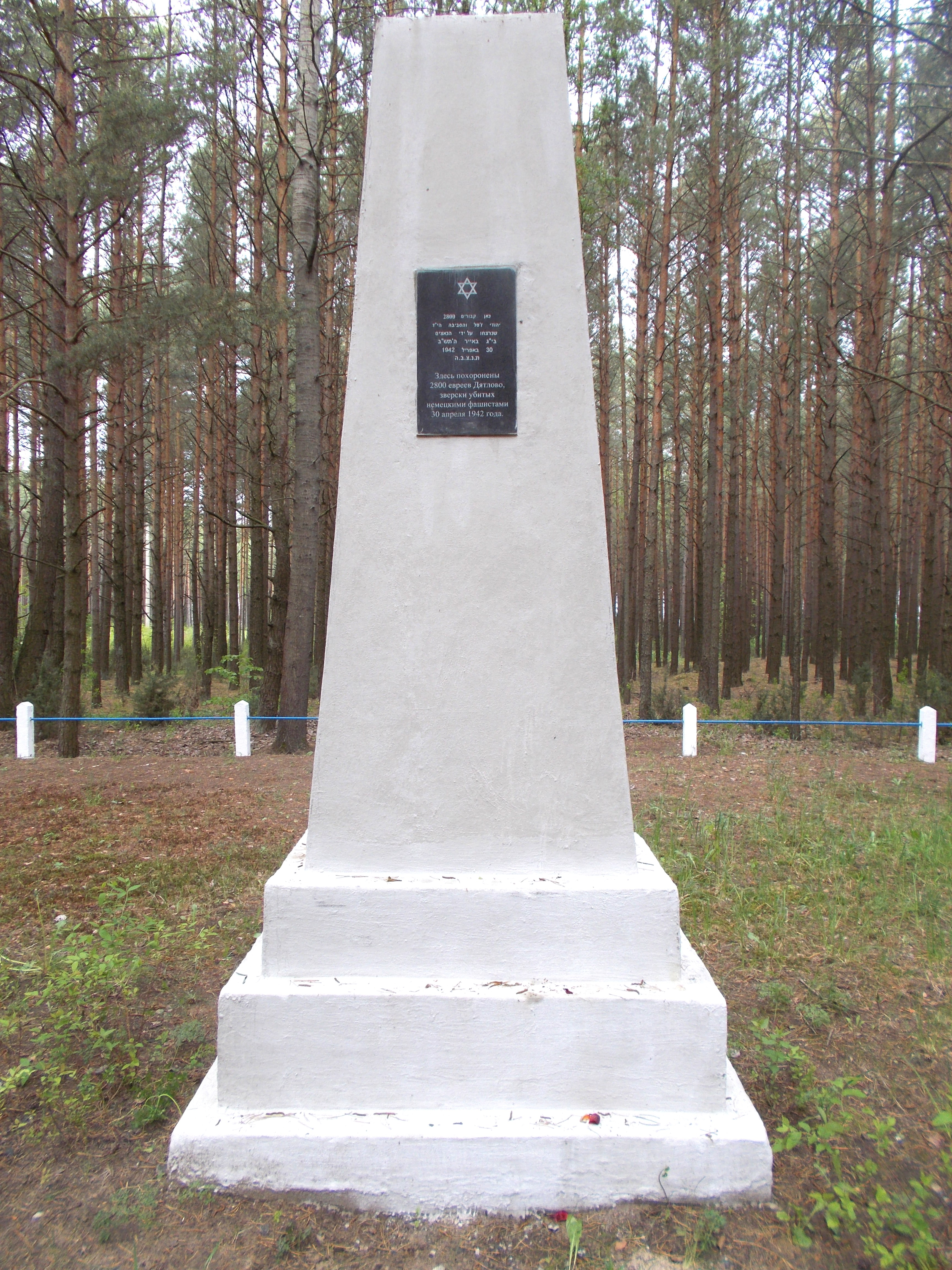 Памятник на месте убийства нацистами 2800 евреев Дятлово 30 апреля 1942 года. Находится на выезде из Дятлово по улице Советской в направлении Лиды и направо 300 метров по дороге Н6006 на санаторий Радон - слева от дороги в лесу.